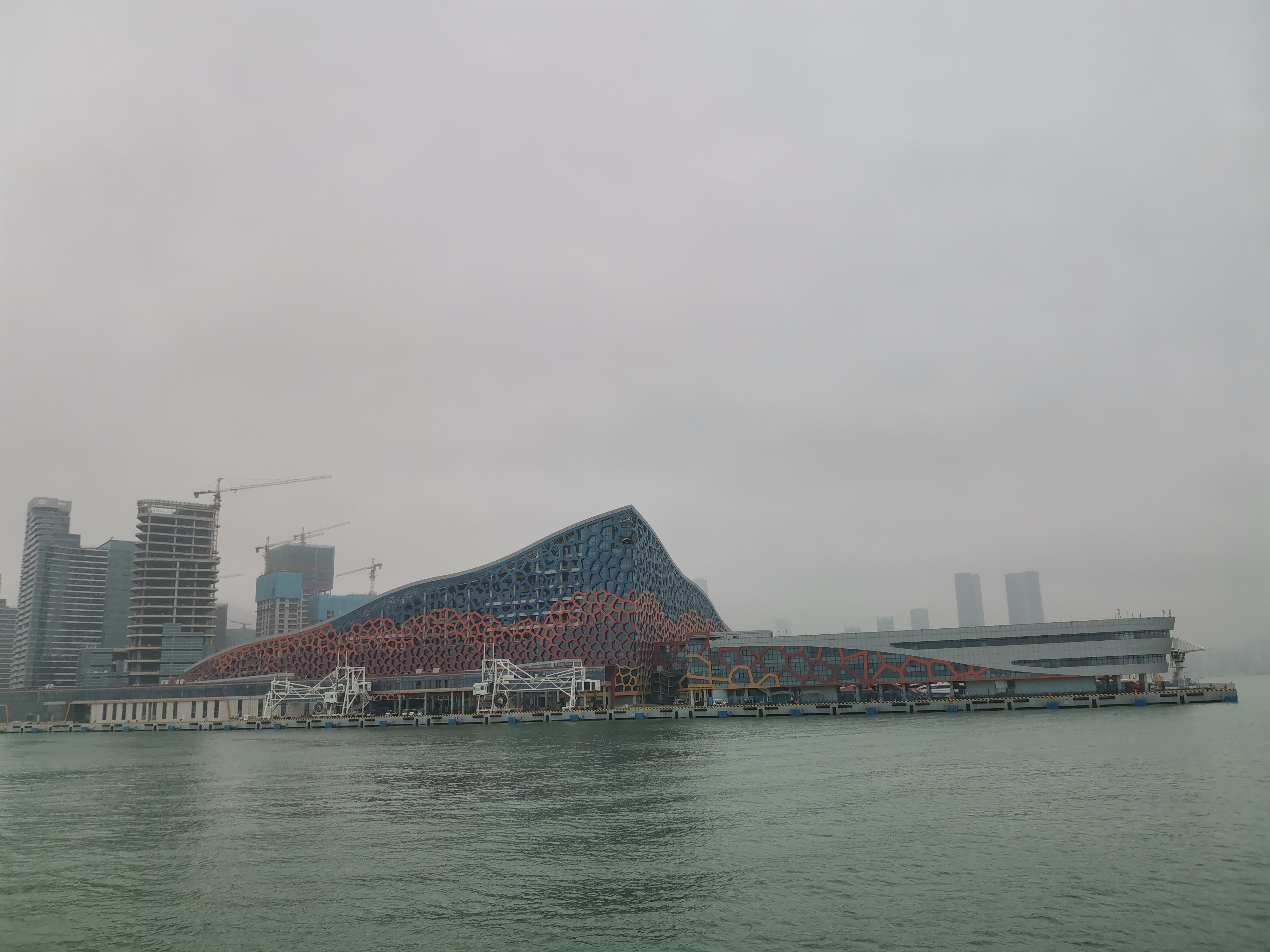 由后海湾迅隆11号上上拍到的蛇口邮轮中心，左侧为邮轮泊位